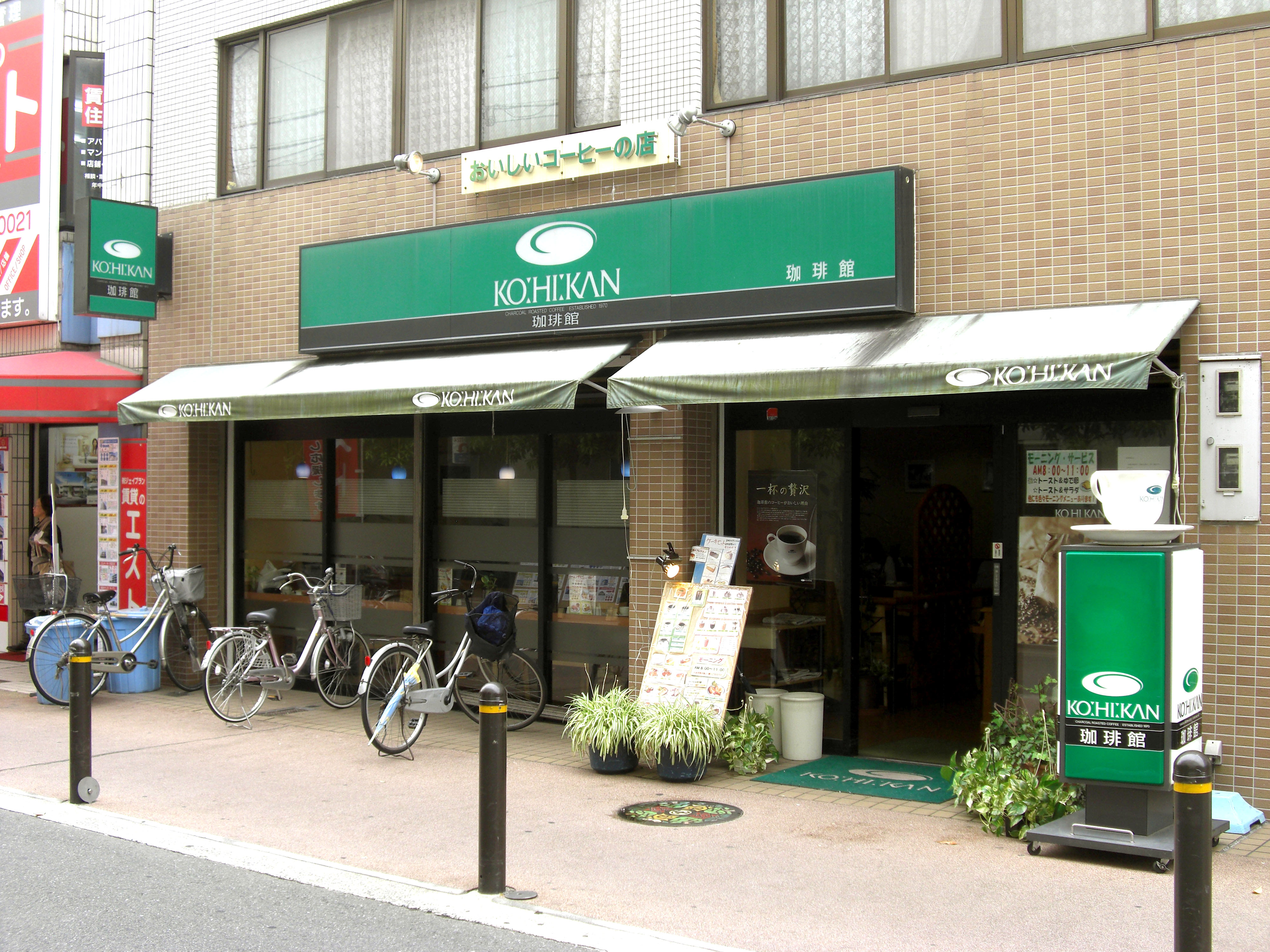 KO:HI:KAN Ibaraki-minami,Nakatsucho Ibaraki-City Osaka Japan.